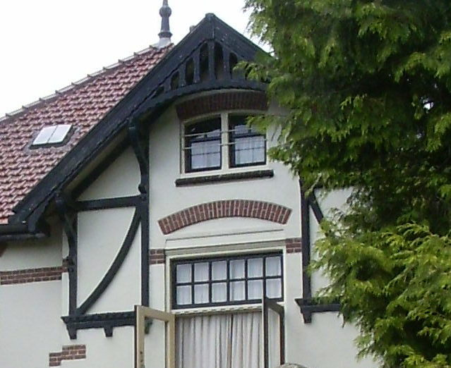 Woning